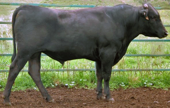 Wagyu bull